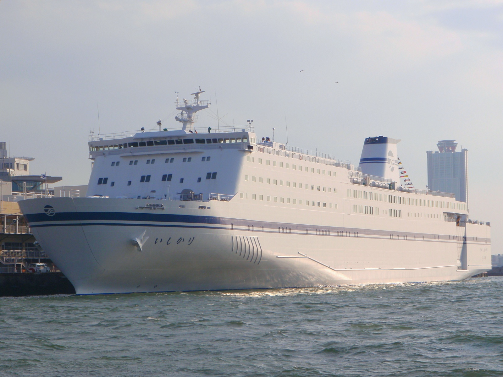 太平洋フェリーが運航するフェリー「いしかり」(3代) 。大阪府大阪市港区の大阪港（ 大阪港#築港| ）にて。（就航前の寄港時に天保山渡船より撮影。）